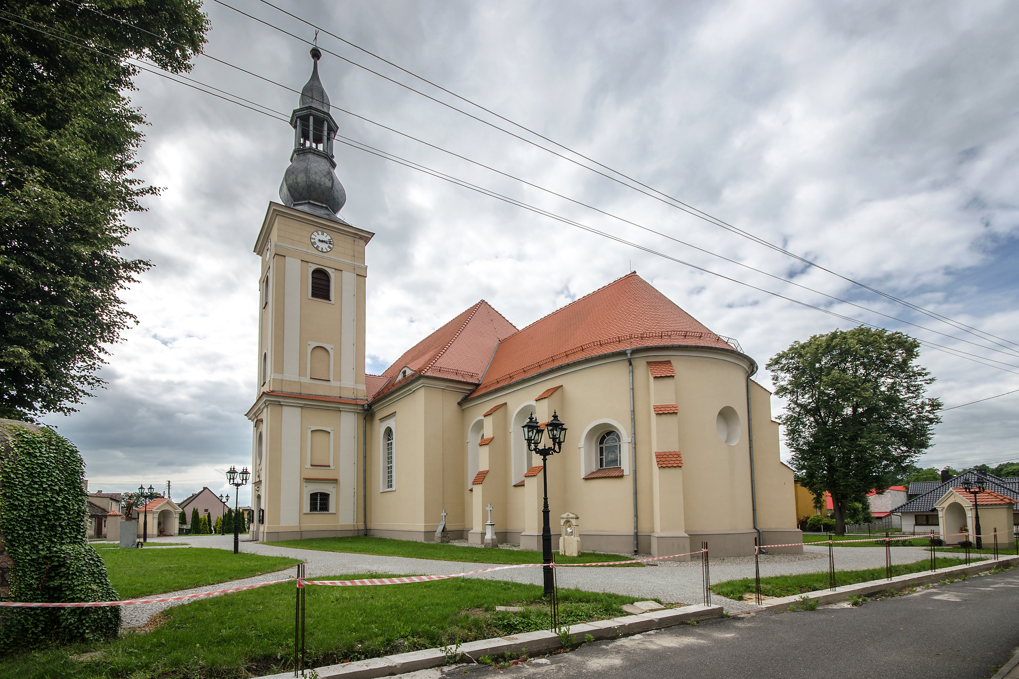 Rychtal, kościół par. p.w. Ścięcia św. Jana Chrzciciela, 1784-1785